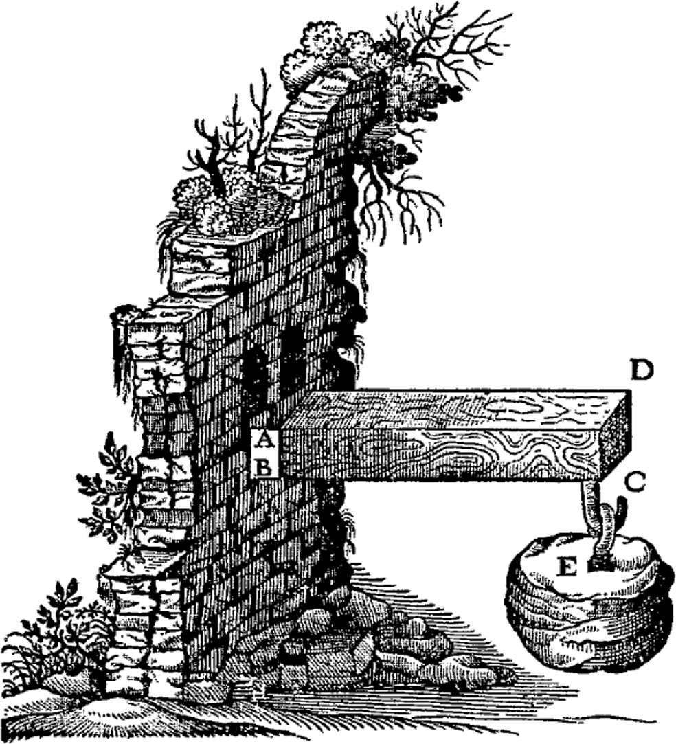 Ein von einer äusseren Last belasteter Balken